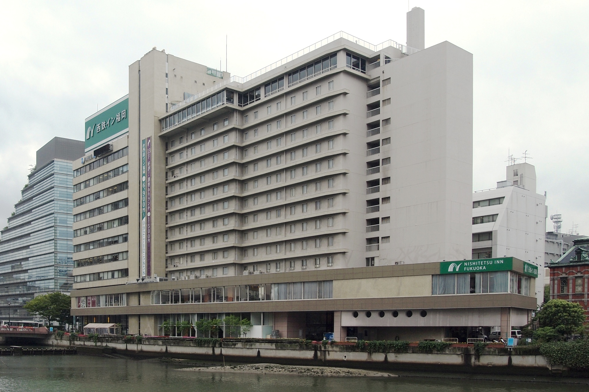 福岡市中央区 毎日福岡会館ビル 西鉄イン福岡、毎日新聞福岡本部などが入居する Zoner Photo Studio 12にて各種補正